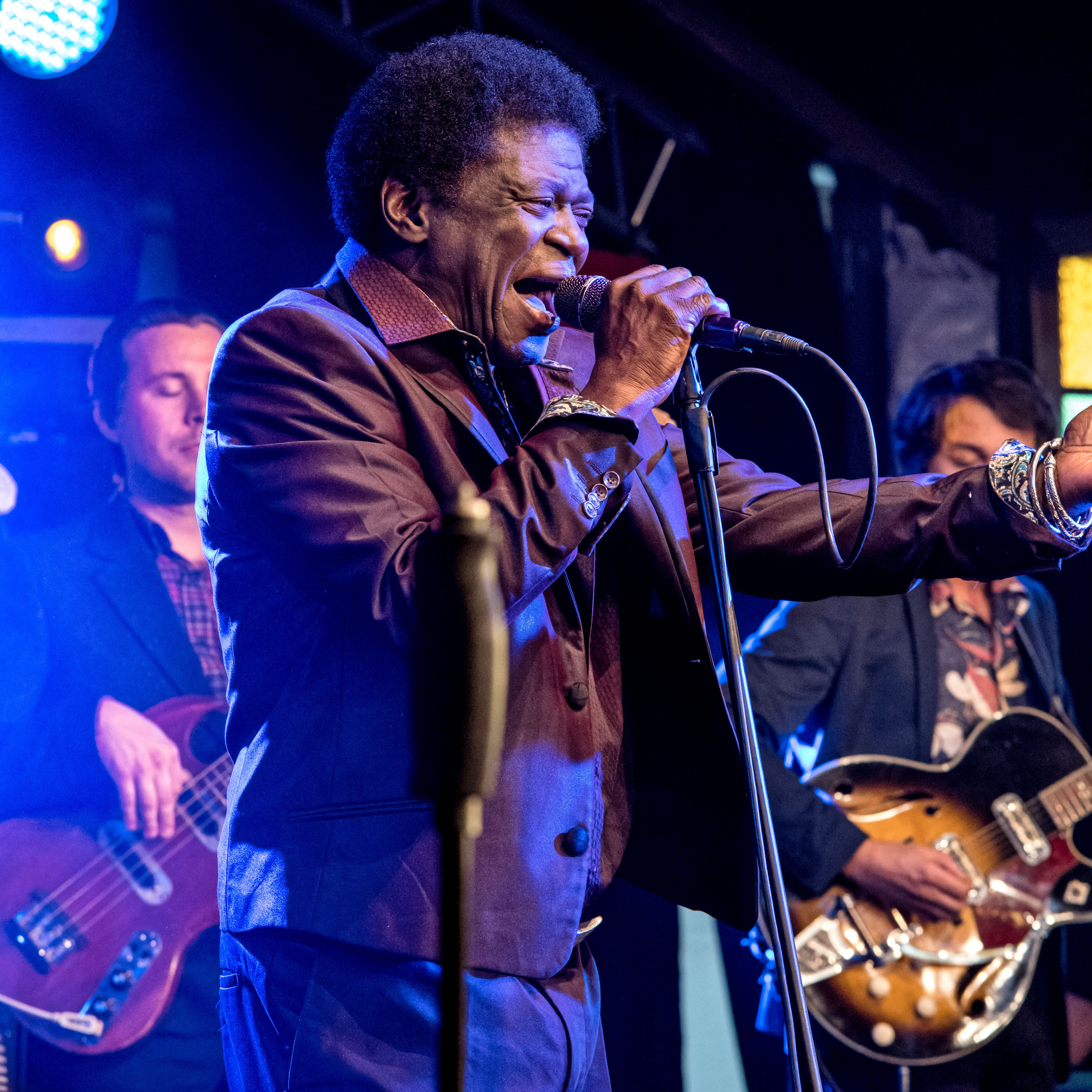 Bilder vom Zelt Musik Festival 2016 in Freiburg im Breisgau Der Soulsänger Charles Bradley